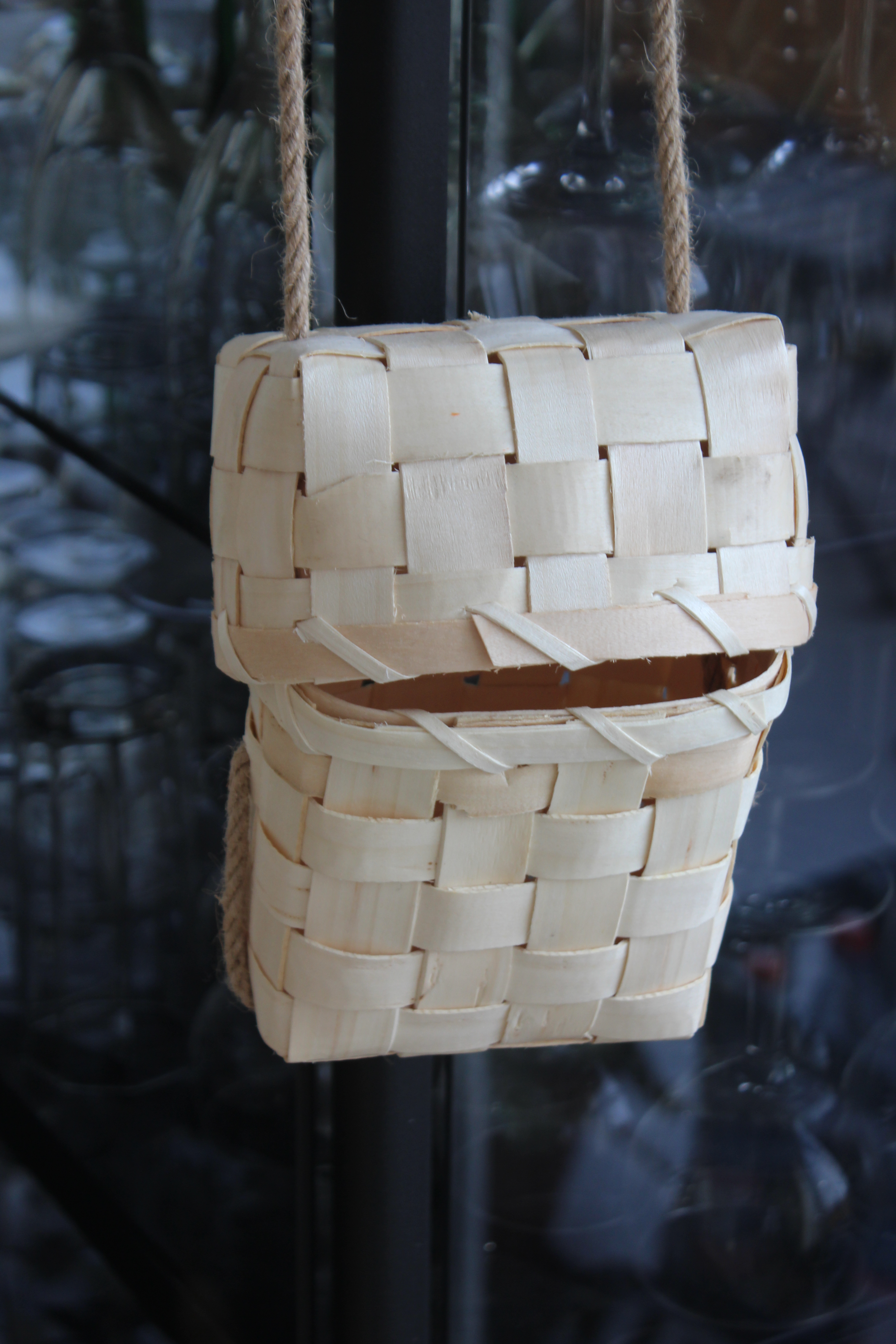 Geflochtener Proviantkorb aus der Uckermark, wie er einst von Land- aber auch Fabrikarbeitern genutzt wurde